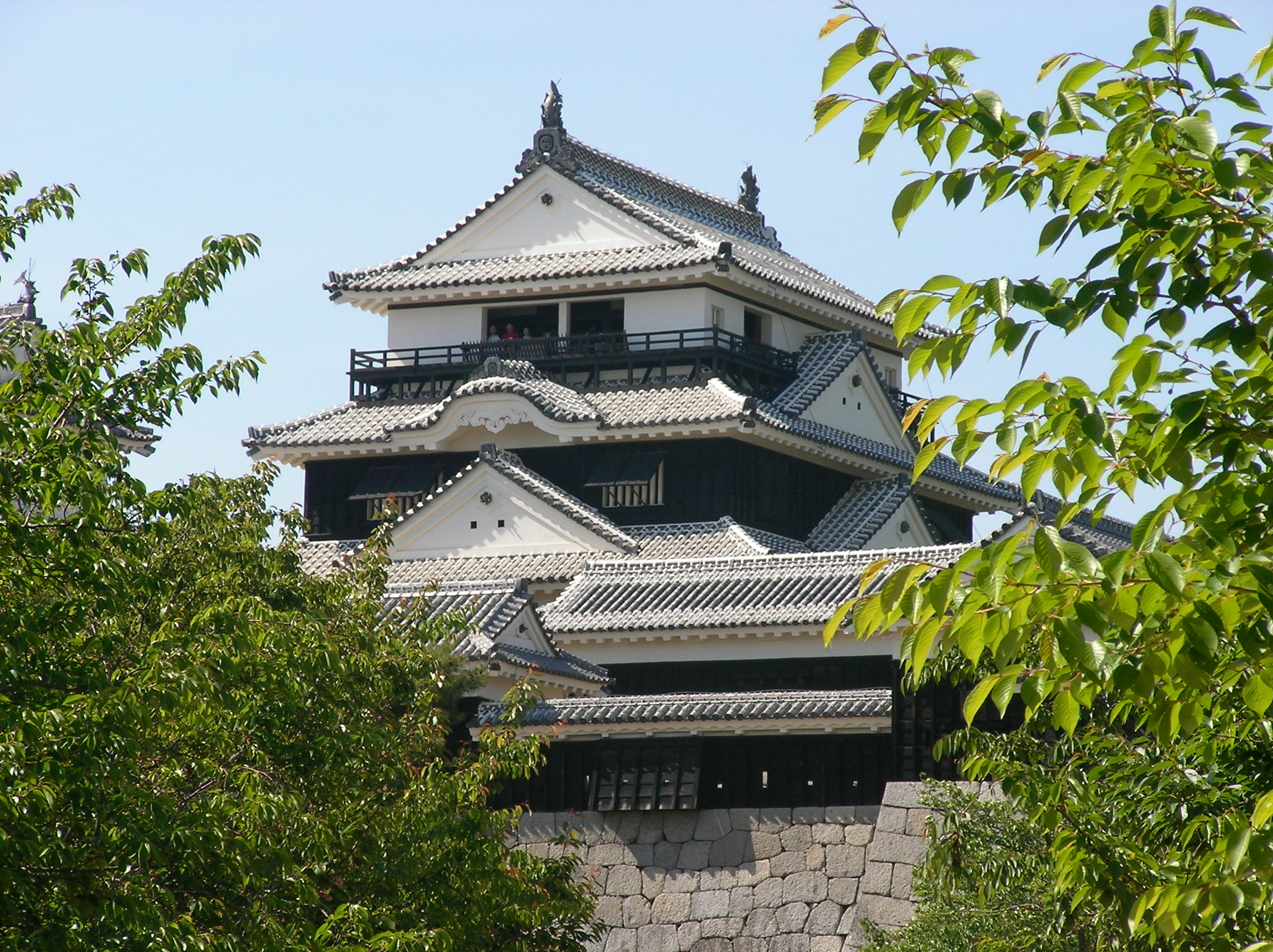 Iyo-Matsuyama Castle